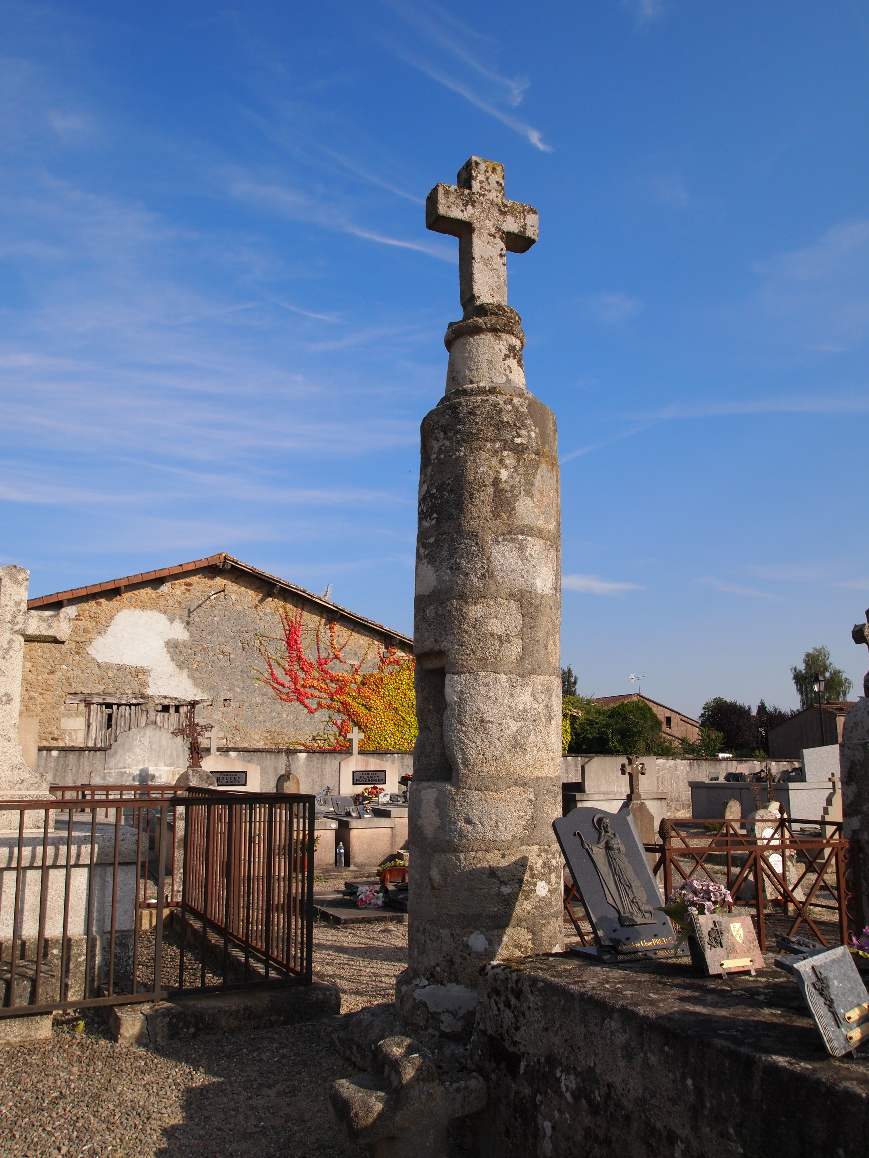 Lanterne des morts, dans le cimetière de Brigueuil en Charente (inscrit, 1932)